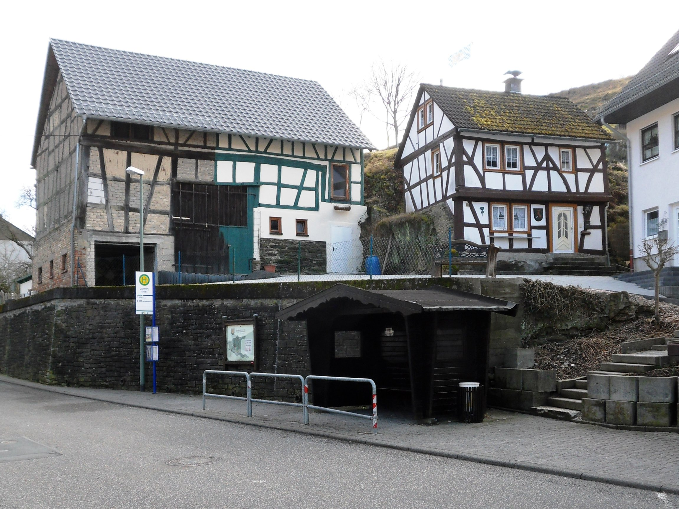 Denkmalgeschütztes Fachwerkwohnhaus Seifenstraße 4 und Fachwerkscheune Marktstraße 14 in Niedergladbach im Taunus, Gemeinde Schlangenbad, Blick von Norden